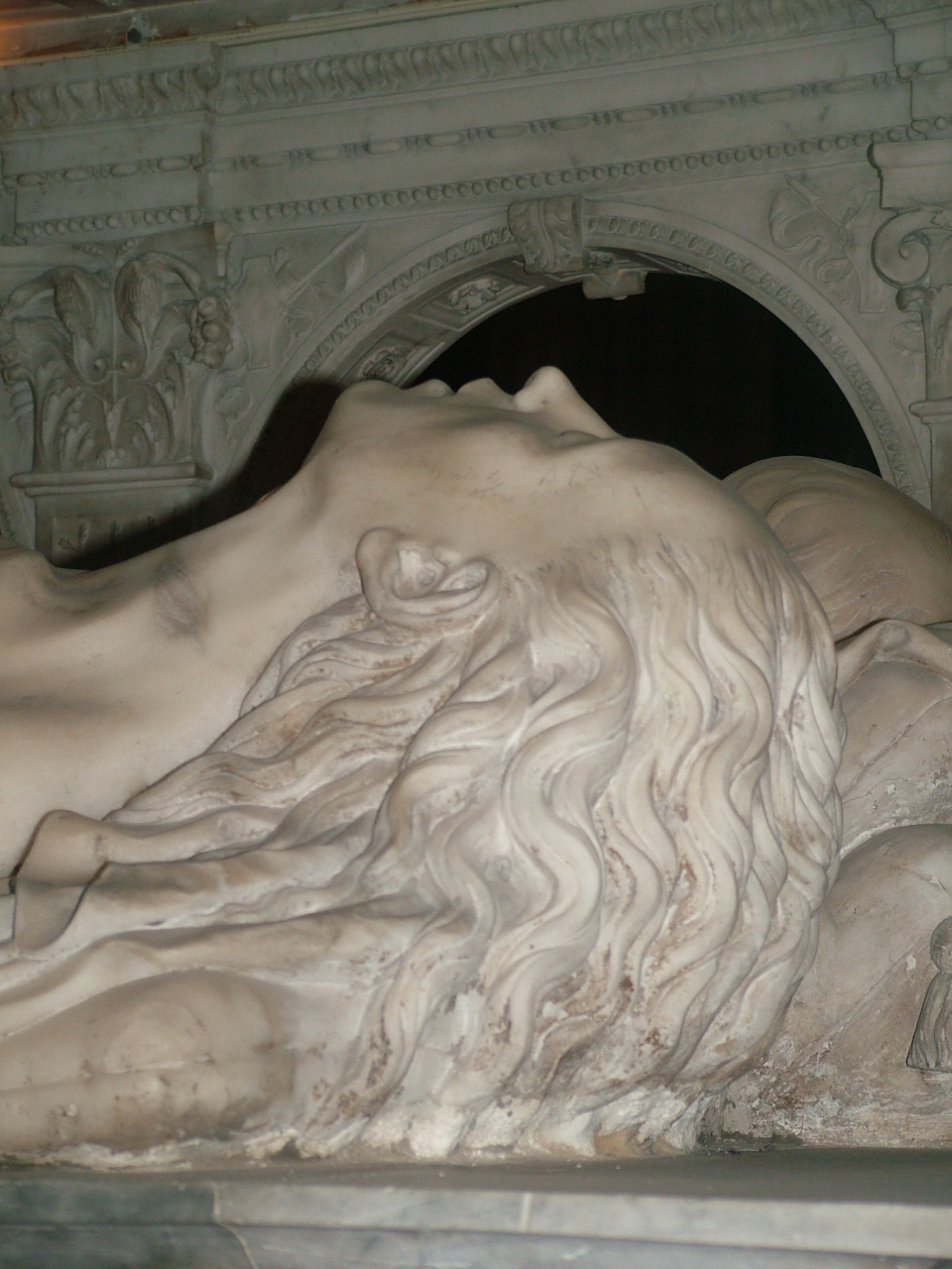 Grab der Anna von Bretagne